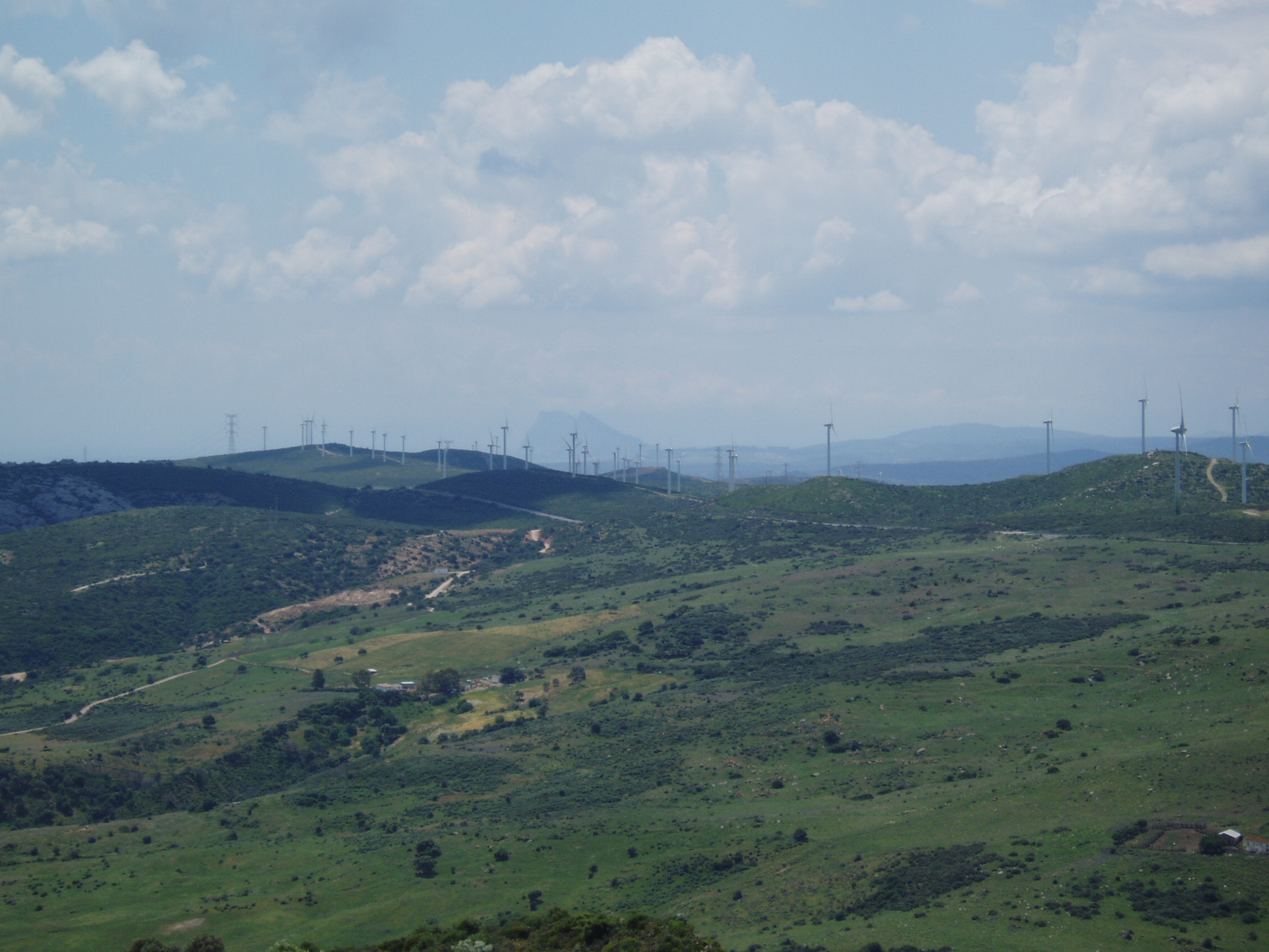 Paisaje de Casares: energia eólica en Andalucía, España.